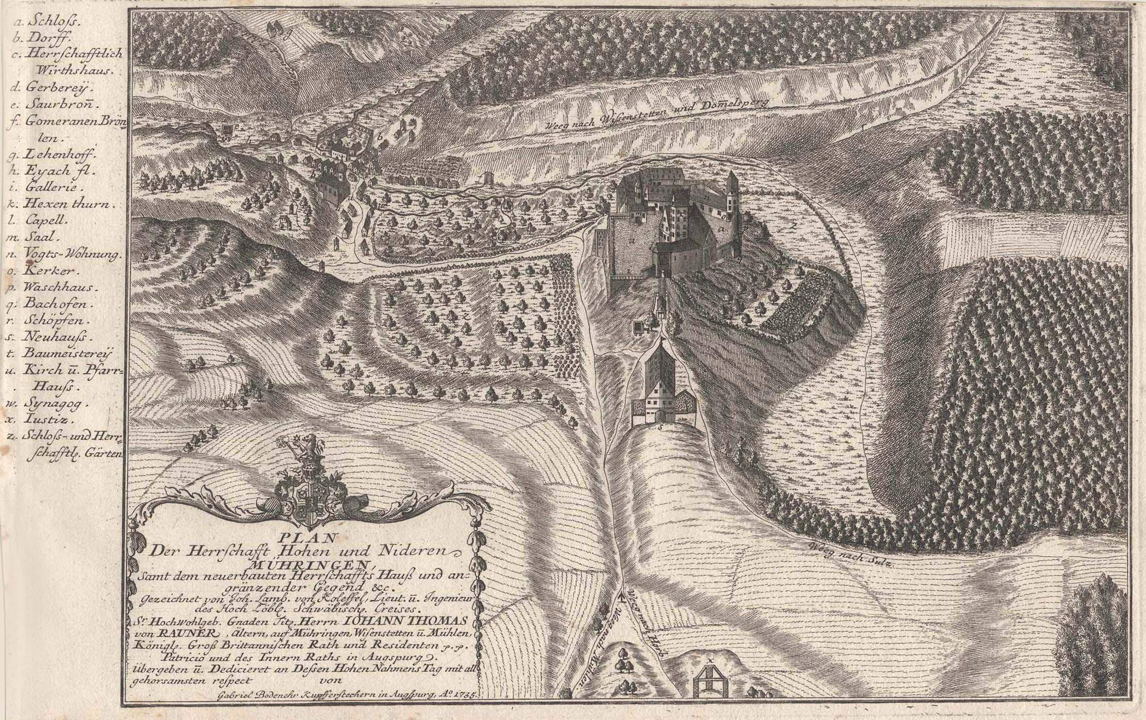 Schloss Hohenmühringen aus der Vogelschau, Plan der Herrschaft Hohenmühringen und Niedermühringen